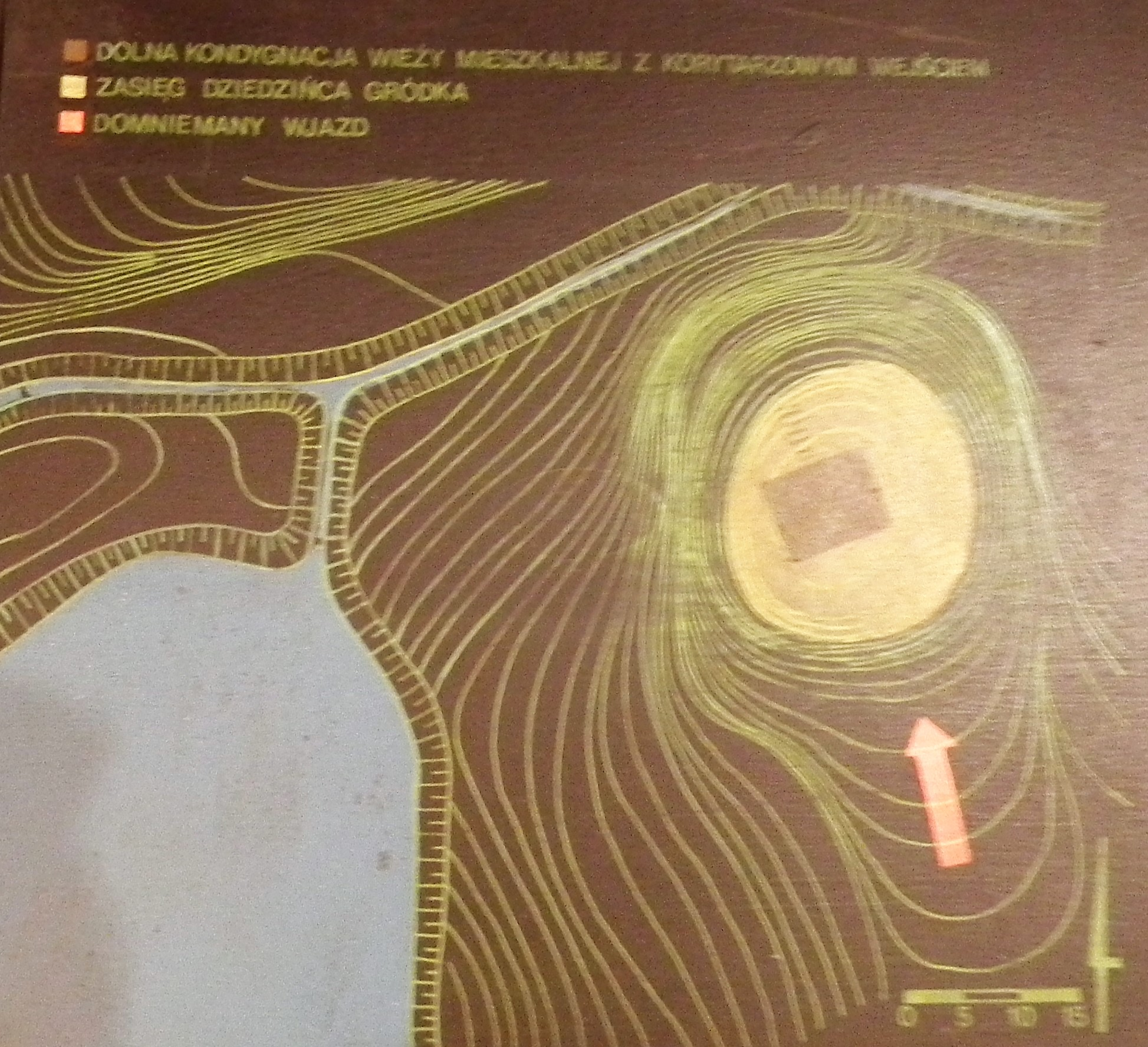 Grodzisko w Plemiętach - materiały w Muzeum w Grudziądzu. Tablica informacyjna.